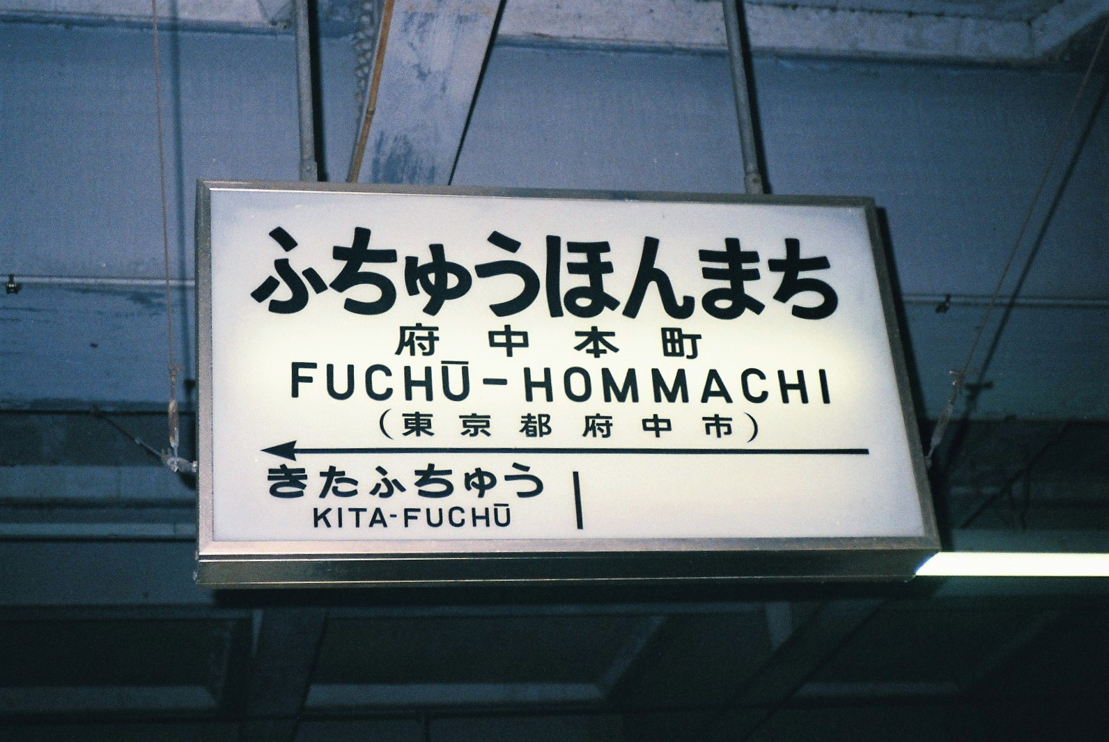 府中本町駅の駅名標（1986年11月撮影）